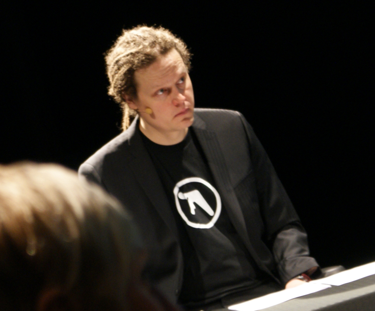 Mikko Kannisen väitöstilaisuus 22.4.2012. Tampereen yliopisto. Teatterimonttu